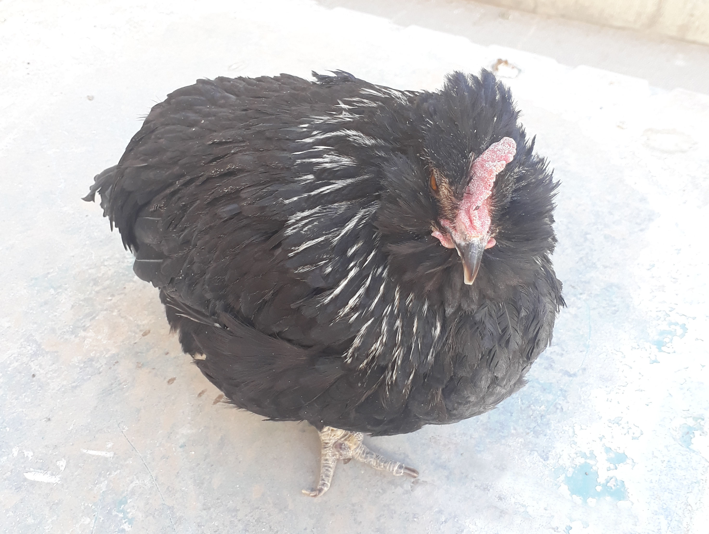 یکی از پیرترین مرغ‌های ایران که ۱۵ سال عمر کرد کاشان، محله دروازه حاج جمال